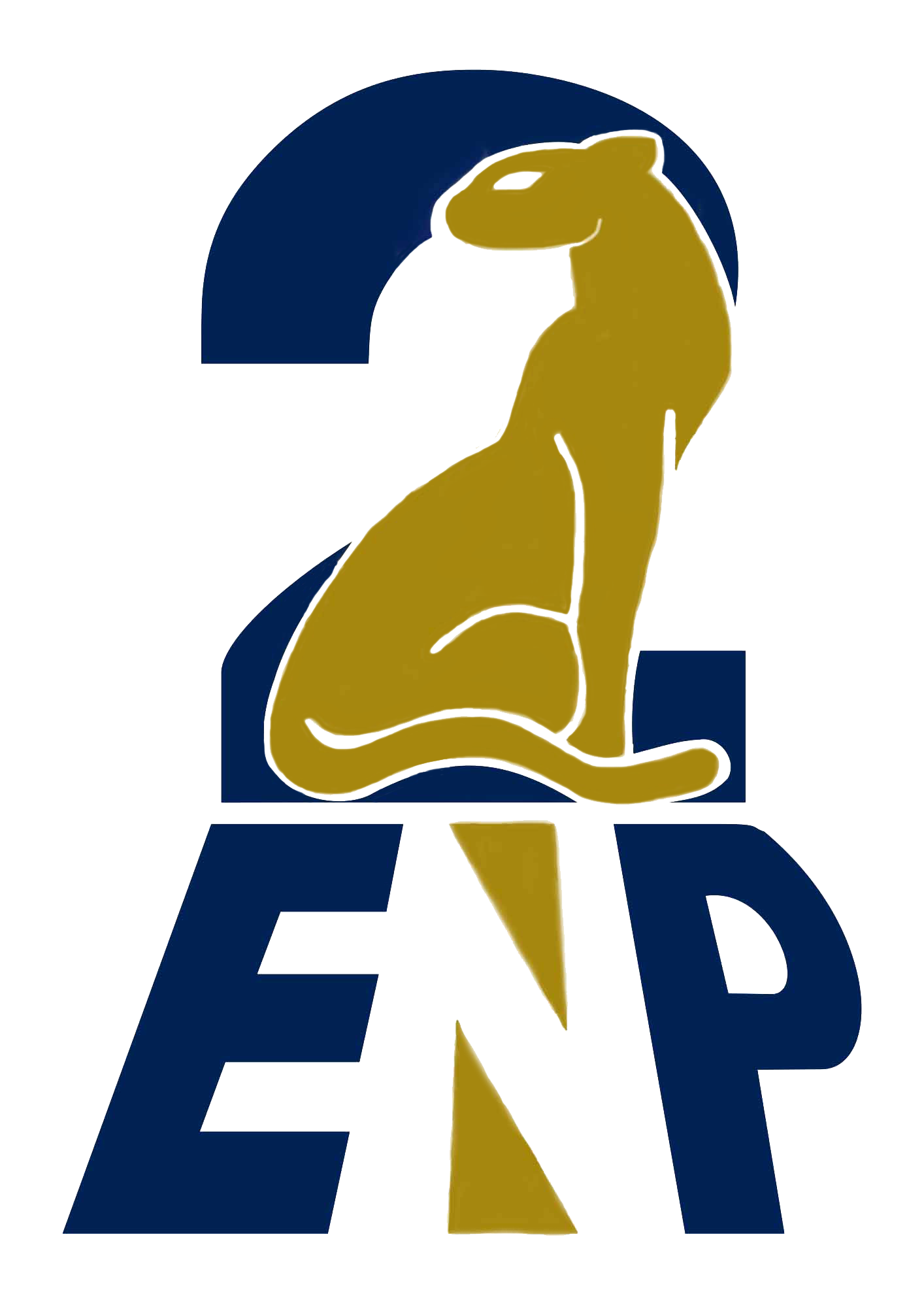 Escudo Plantel 2 "Erasmo Castellanos Quinto", versión de huitzil68 (Aurelio Mendoza Garduño).